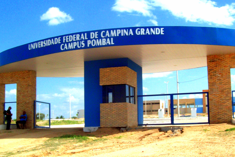 Camus da UFCG na cidade de Pombal